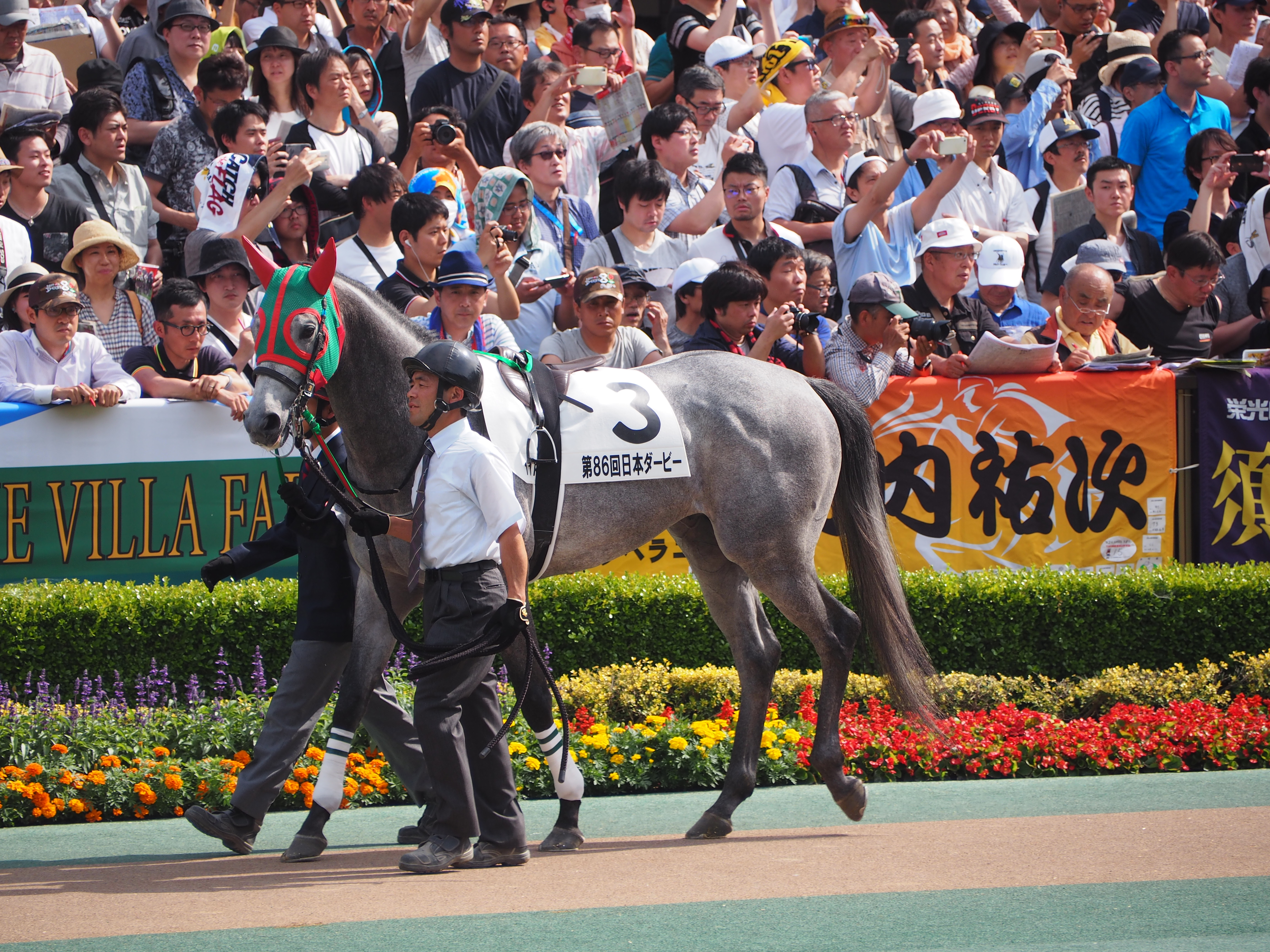 日本ダービー 東京優駿 パドック